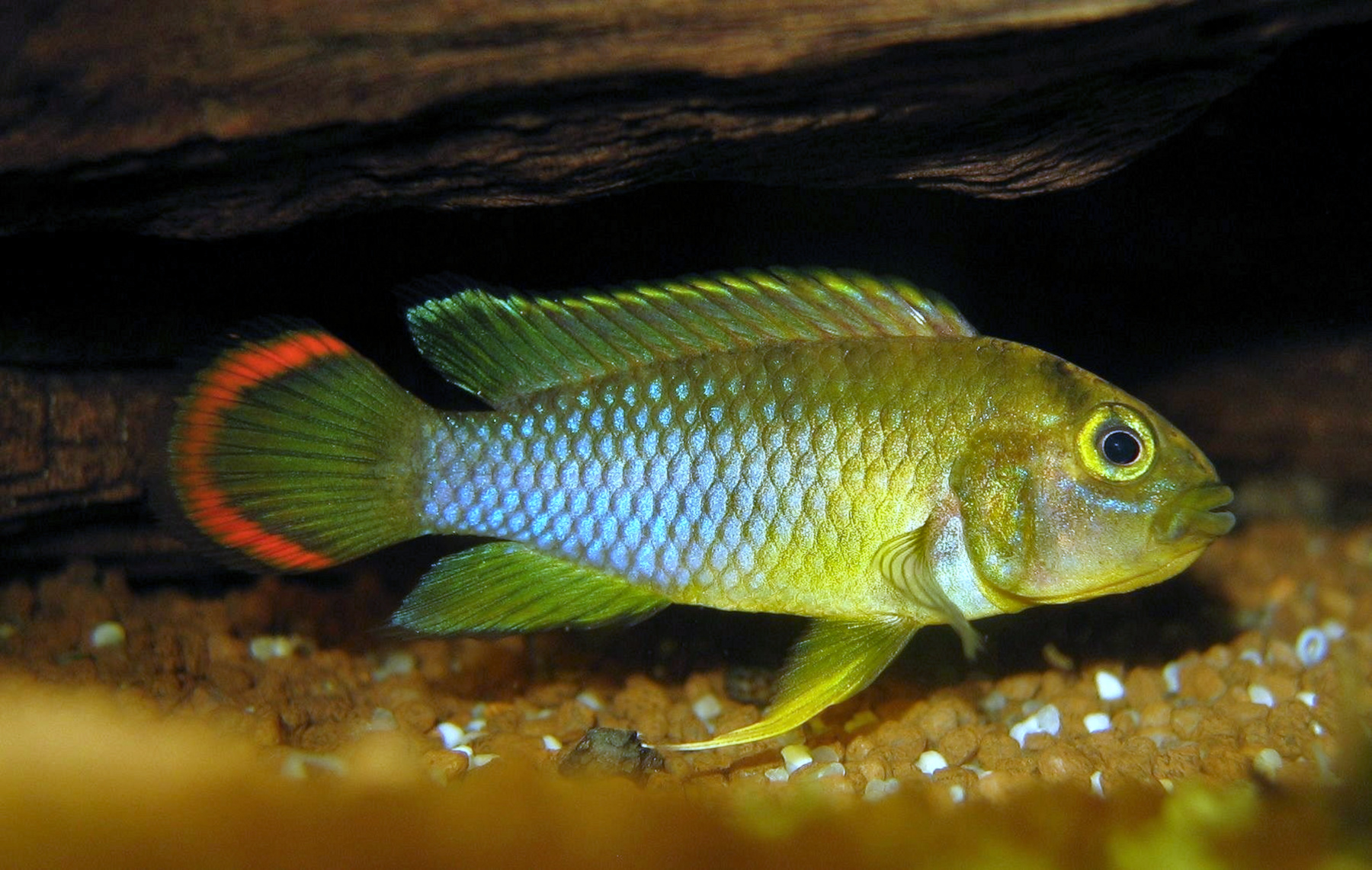 male Apistogramma nijsseni